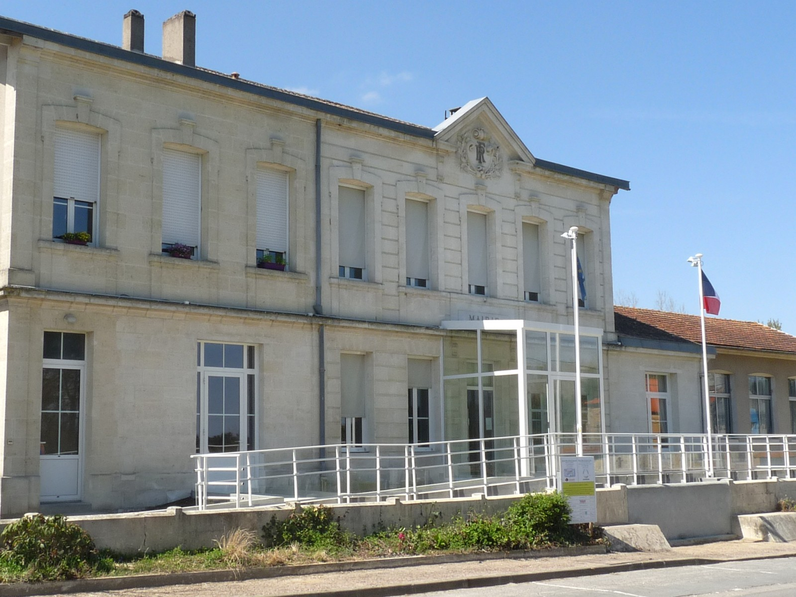 Mairie de Lagorce (à Montigaut), Gironde, France